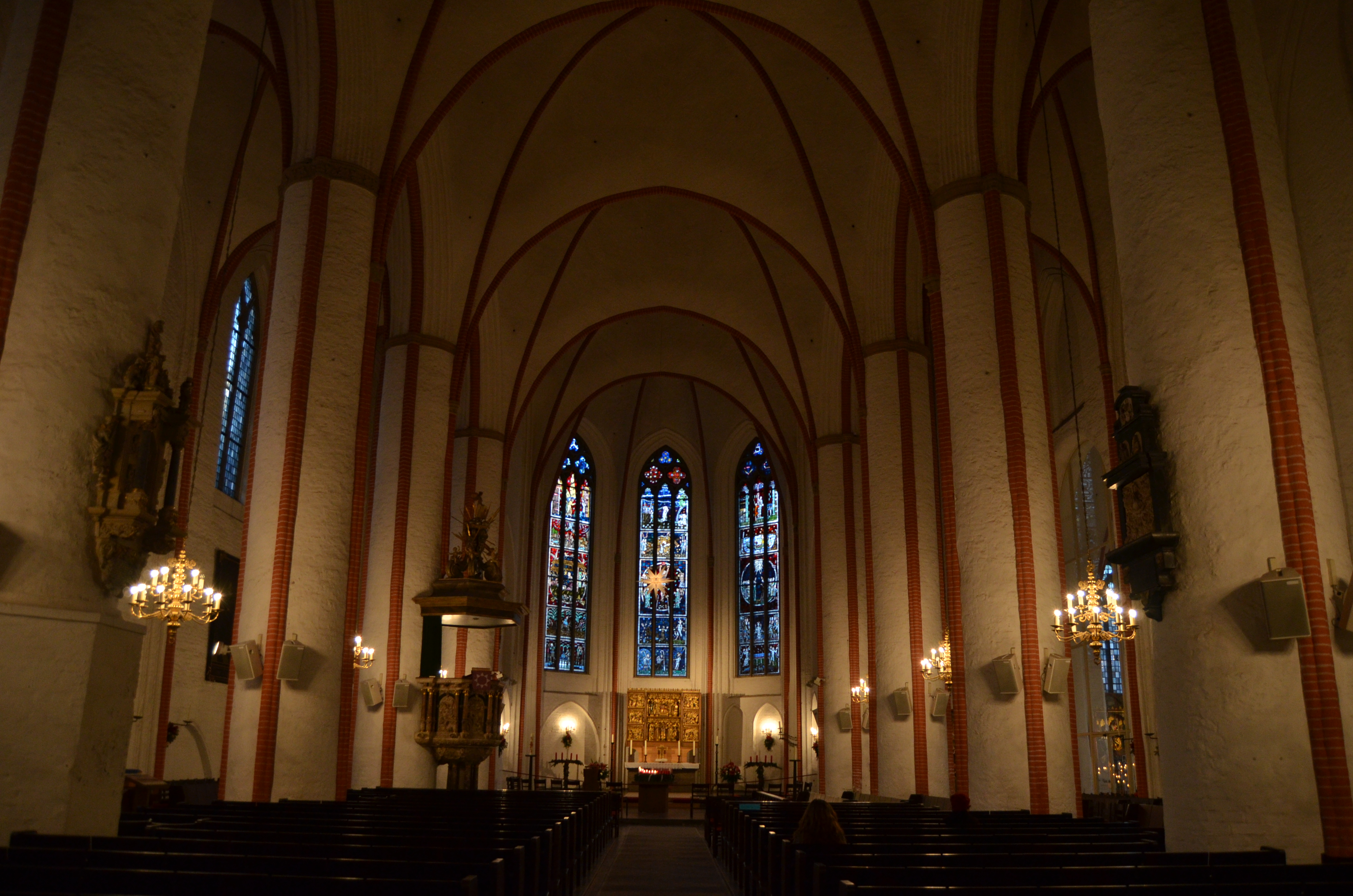 Silent prayer